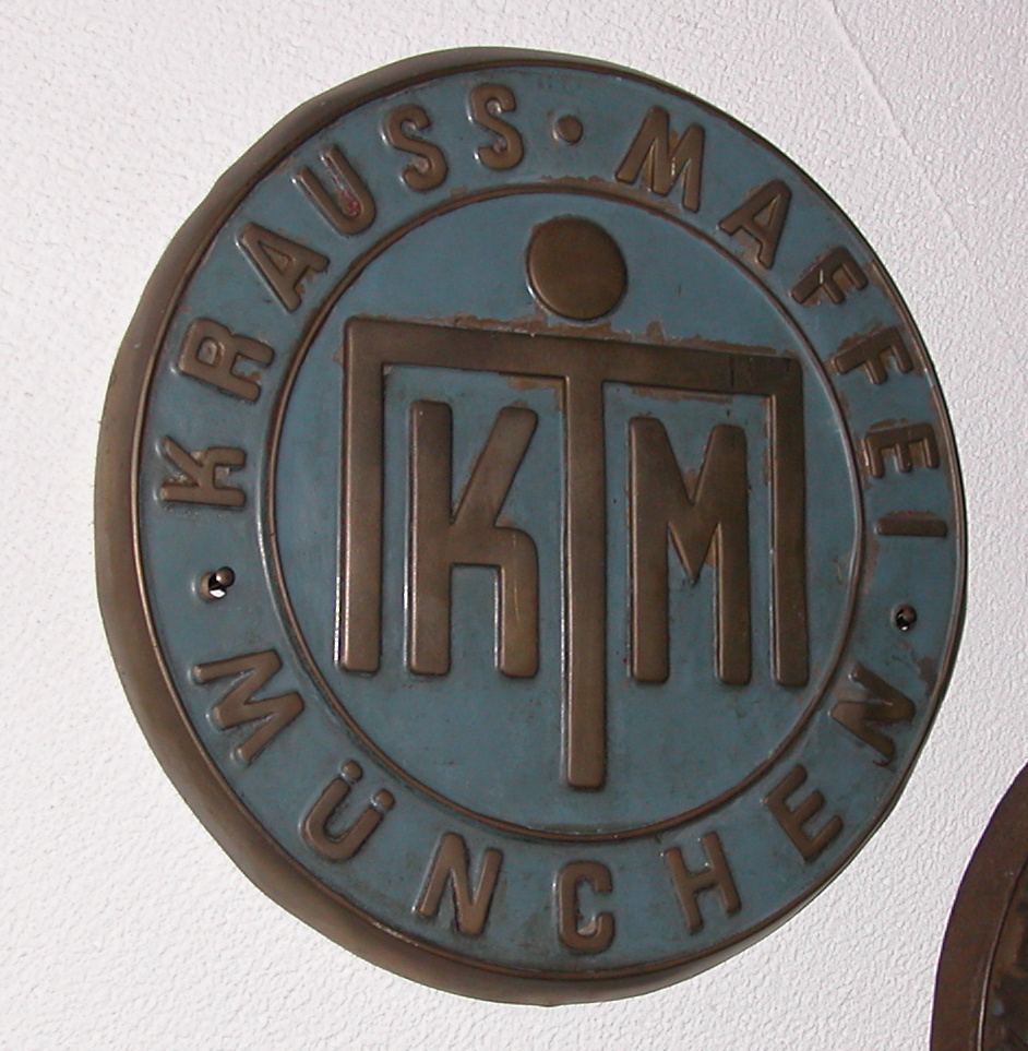 Fabrikschild KM für V200